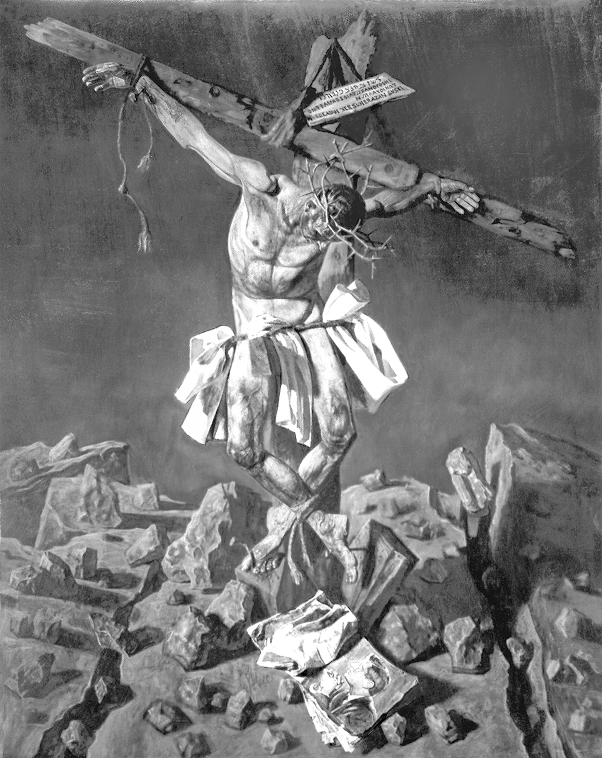 TITULO: Cristo de Kennedy. También llamado Cuarto Cristo. TÉCNICA: Técnica mixta temple - óleo. SOPORTE: Lienzo. MEDIDAS: 278 x 337 cm. (Aprox.)